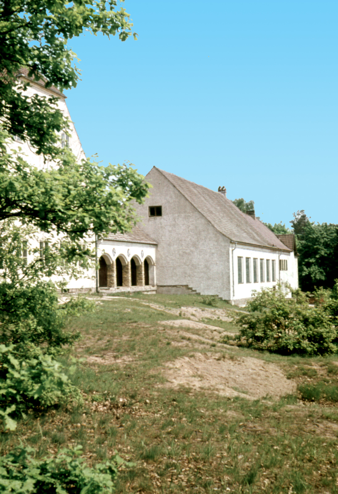 Kleinmachnow, um 1965: Gebäude der Weinbergschule von der Südseite